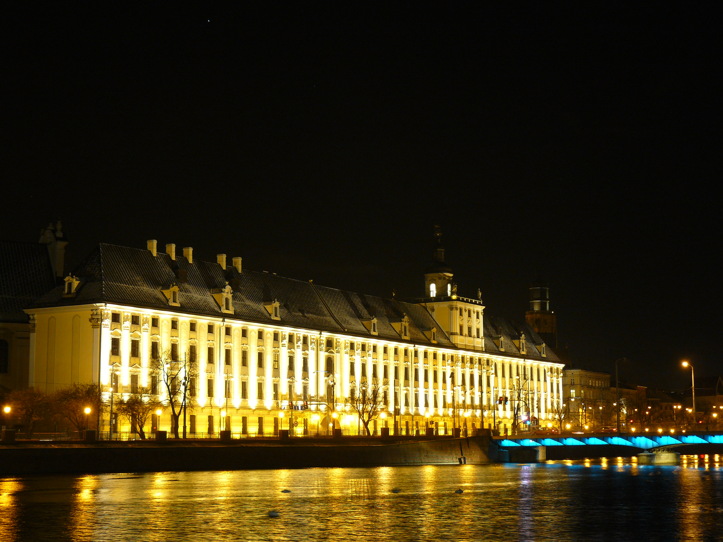 Uniwersytet Wrocławski - gmach główny, po prawej Most Uniwersytecki